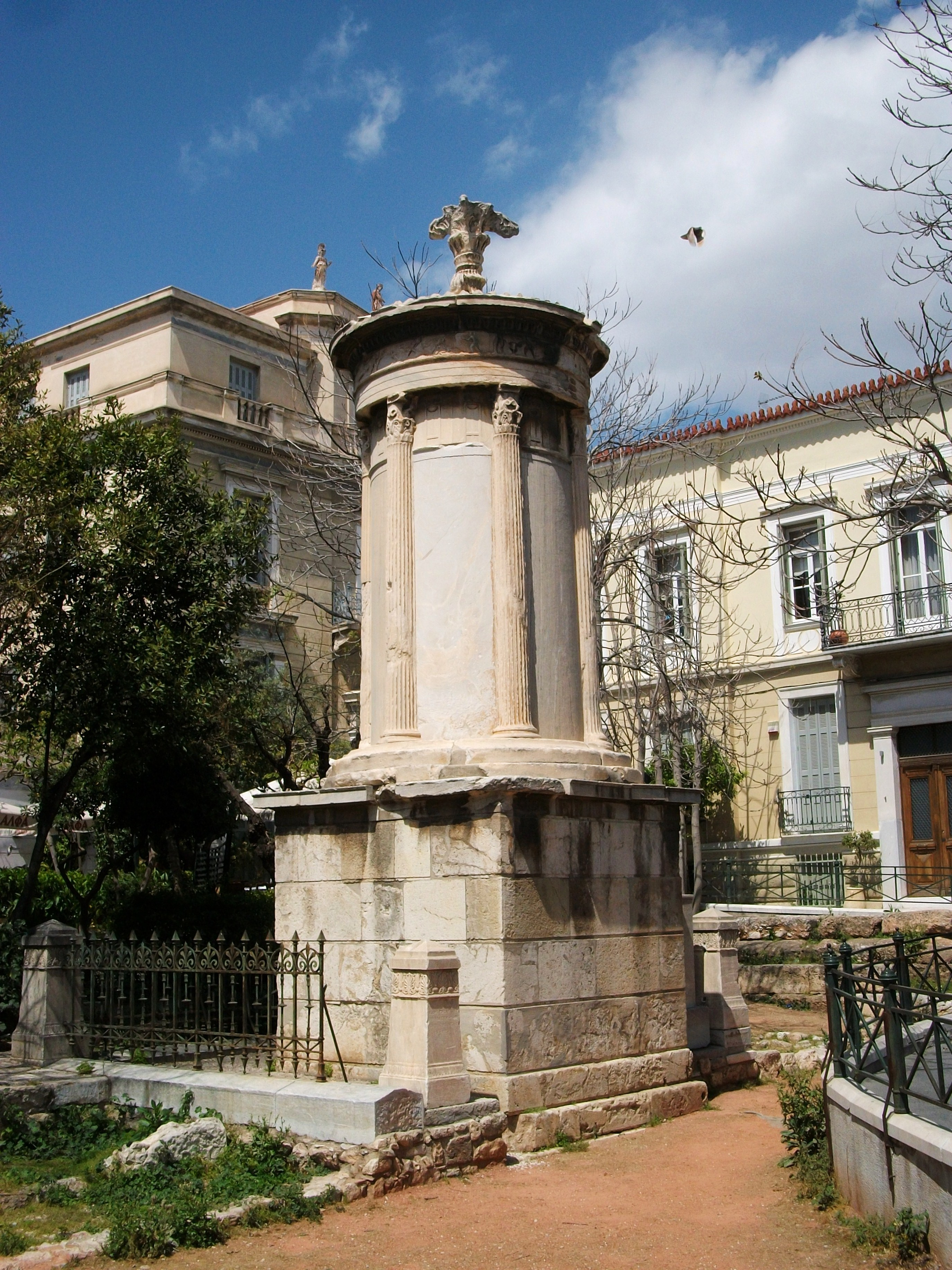 Monument de Lisícrates, Atenes.